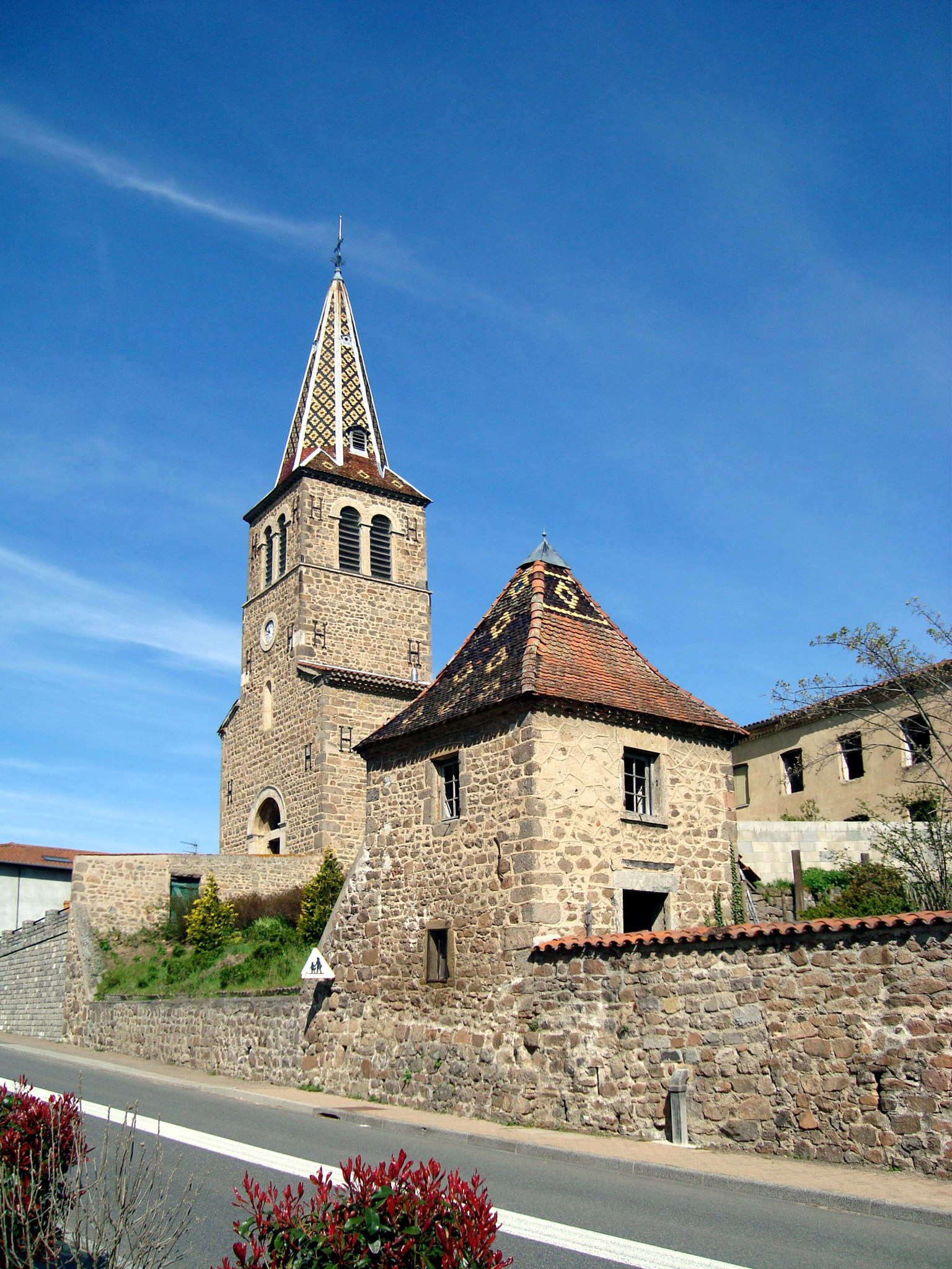 Église dédiée à Ste Suzanne, Les Halles, Rhône, France.